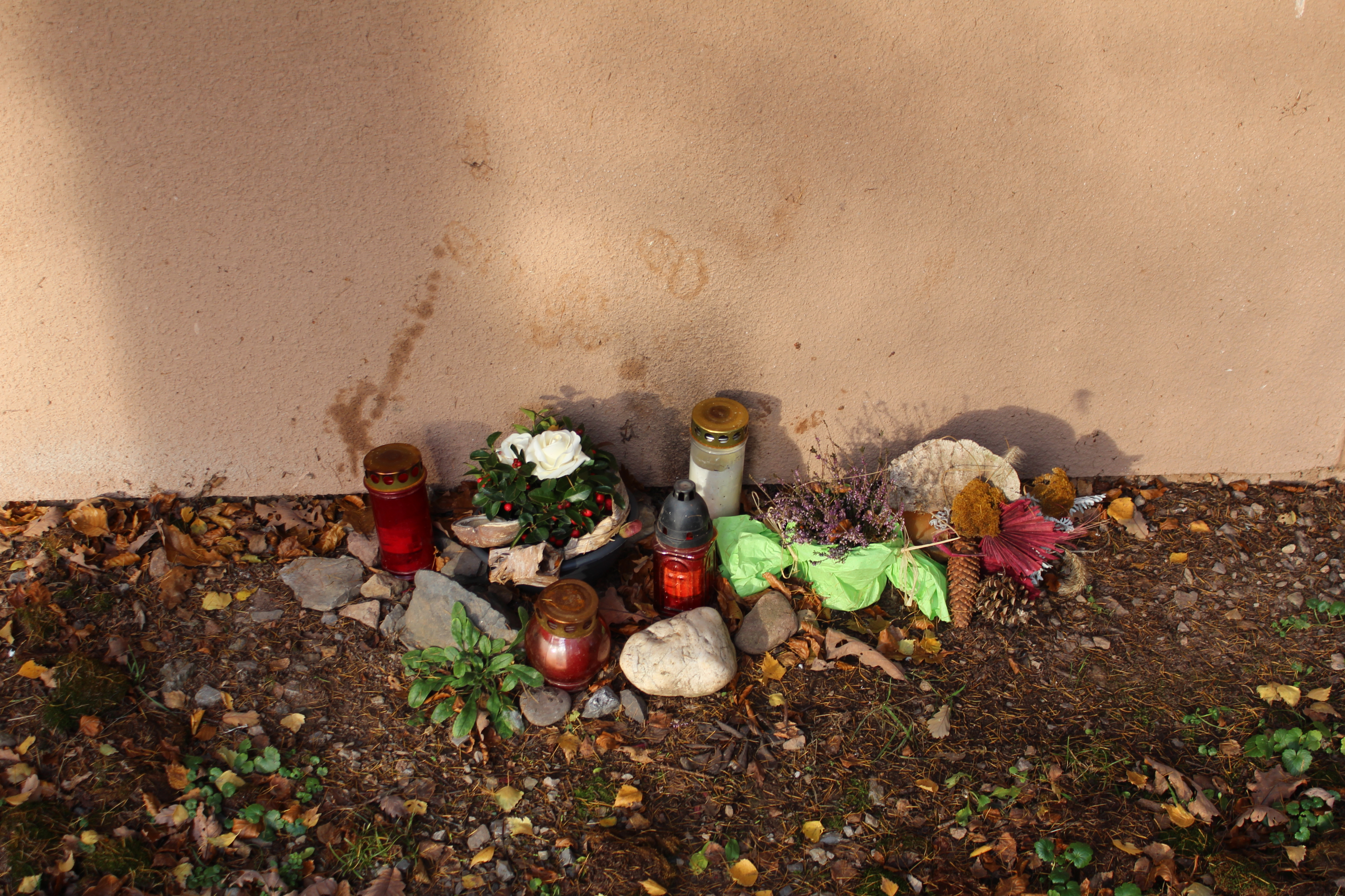 Trauergedenkstätte am Sendeturm Bad Brückenau